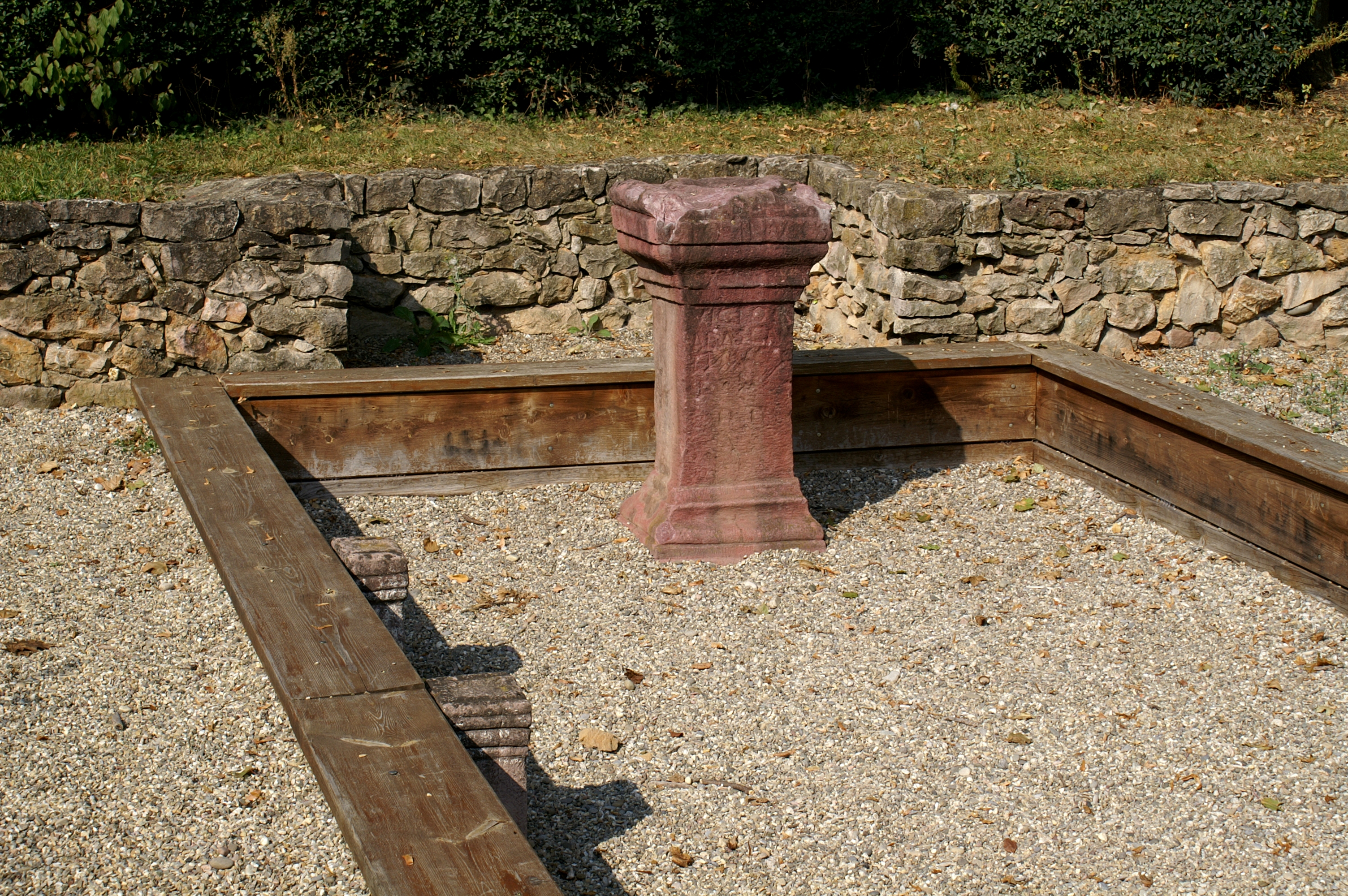 1974 wurden in Riegel am Kaiserstuhl die Fundamente eines römischen Tempels freigelegt. Seit 1986 ist die Anlage ein kleines Freilichtmuseum